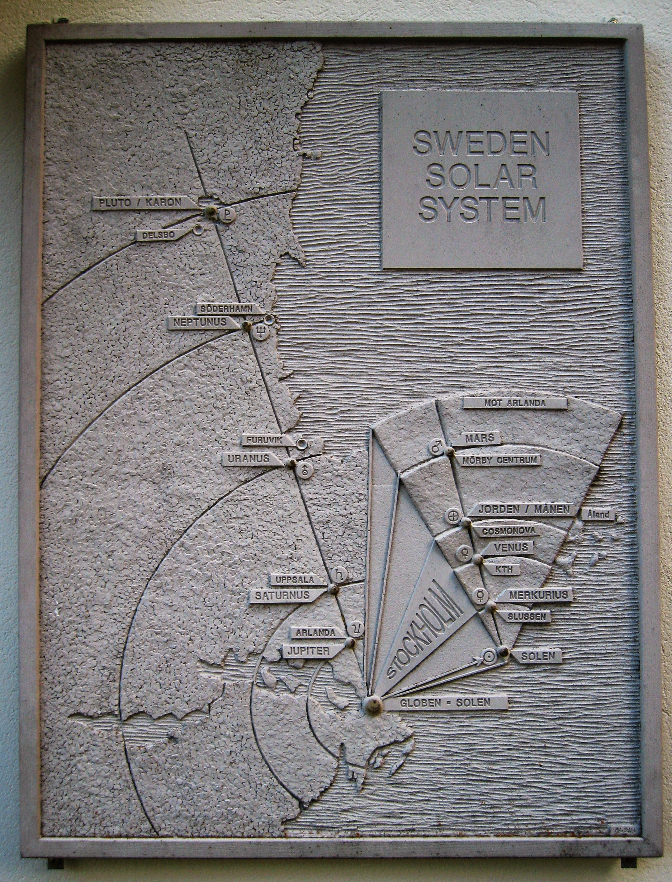 Väggplakett för Sweden Solar System.